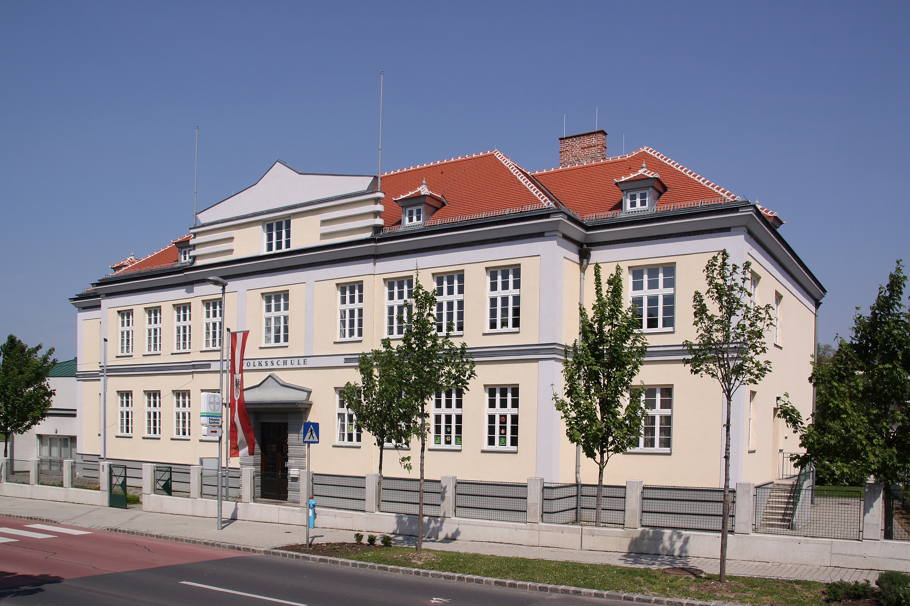 Rohrbach bei Mattersburg - Volksschule (denkmalgeschützt)